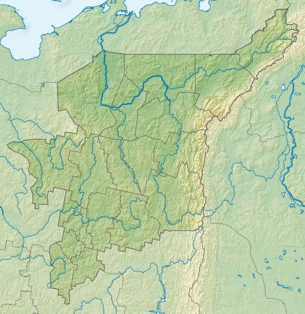 Республика Коми (Россия), физическая карта. Координаты границ: E 44.9 66.7 N 58.9 68.7 Координаты для GMT: -R44.9/66.7/58.9/68.7 Инструменты: GMT, Inkscape This map may be incomplete, and may contain errors. Don't rely solely on it for navigation.